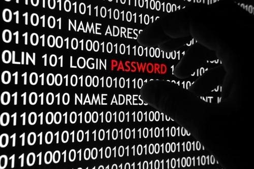 Монгол: telnet